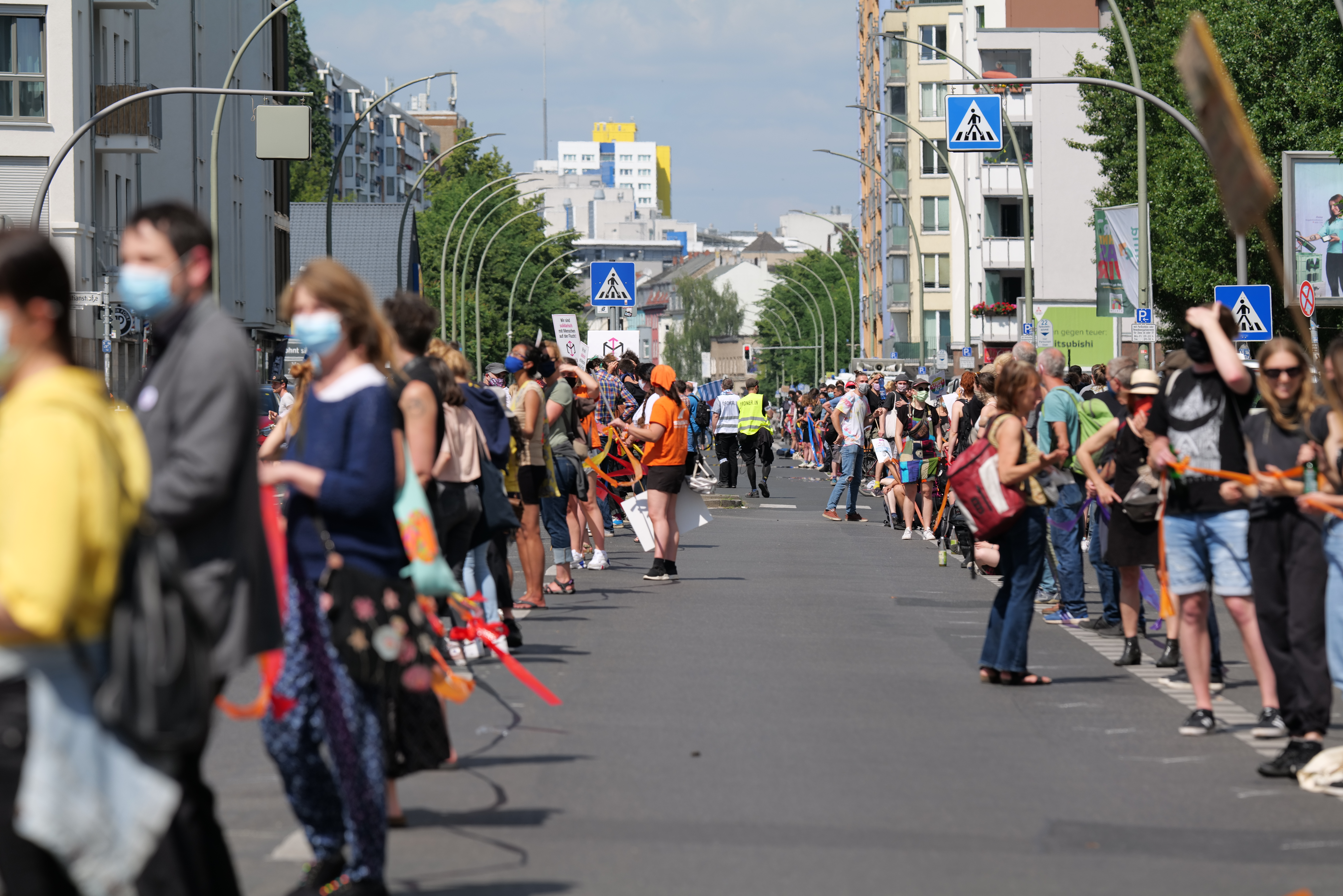 Menschenkette des Unteilbar Bündnisses für Solidarität vom Brandenburger Tor zum Hermannplatz in Berlin am 14. Juni 2020.